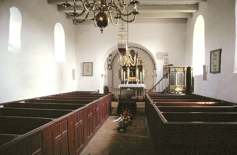 Gødvad Kirke, kirkerummet, set mod øst; Silkeborg Kommune, Denmark